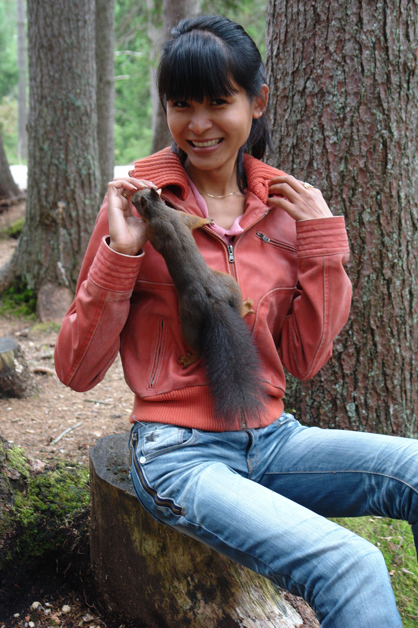 Zahmes Eichhörnchen in Seefeld in Tirol.